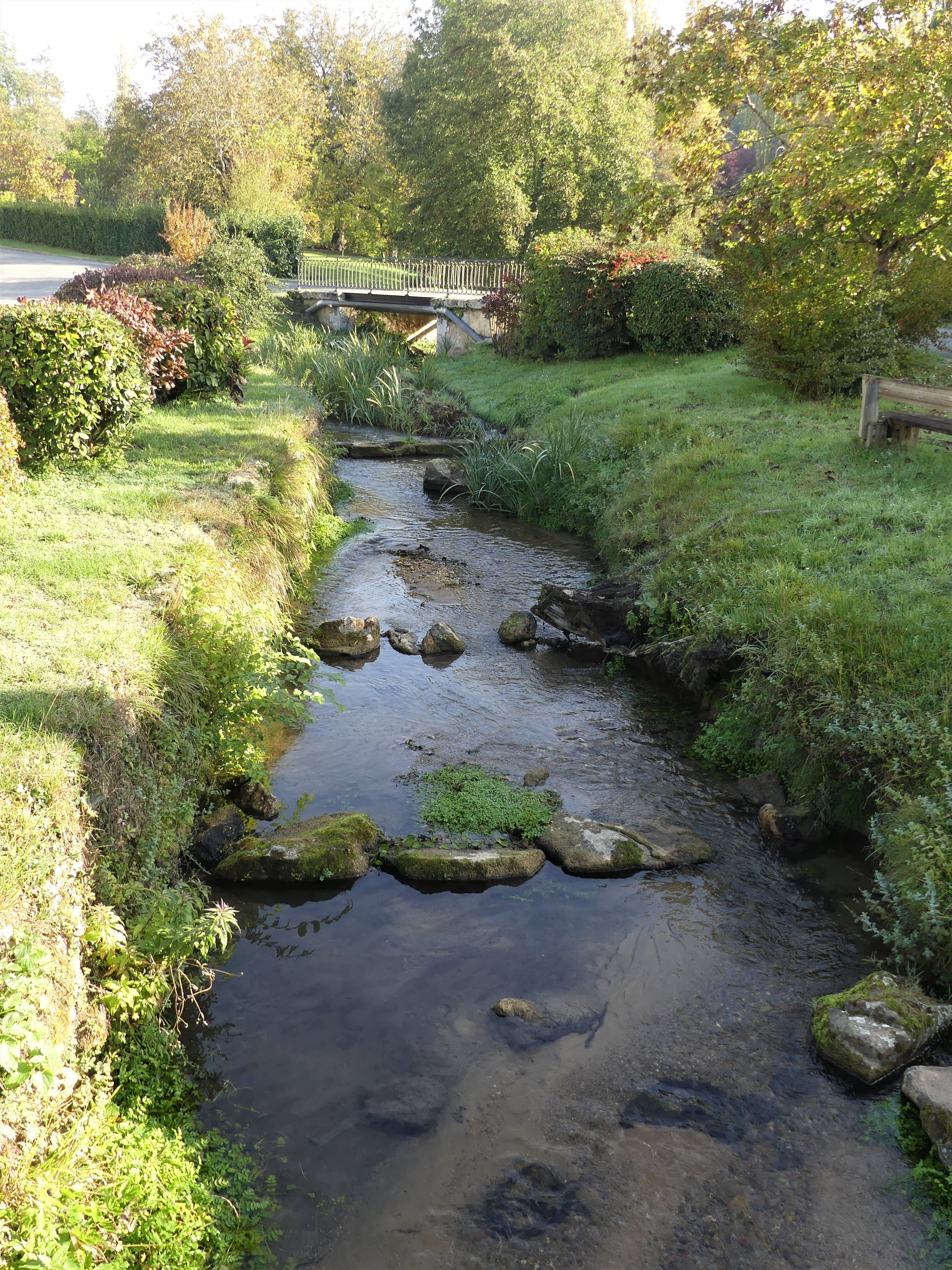 L'Eyraud à la passerelle du bourg de Laveyssière, Vue prise en direction de l'amont.